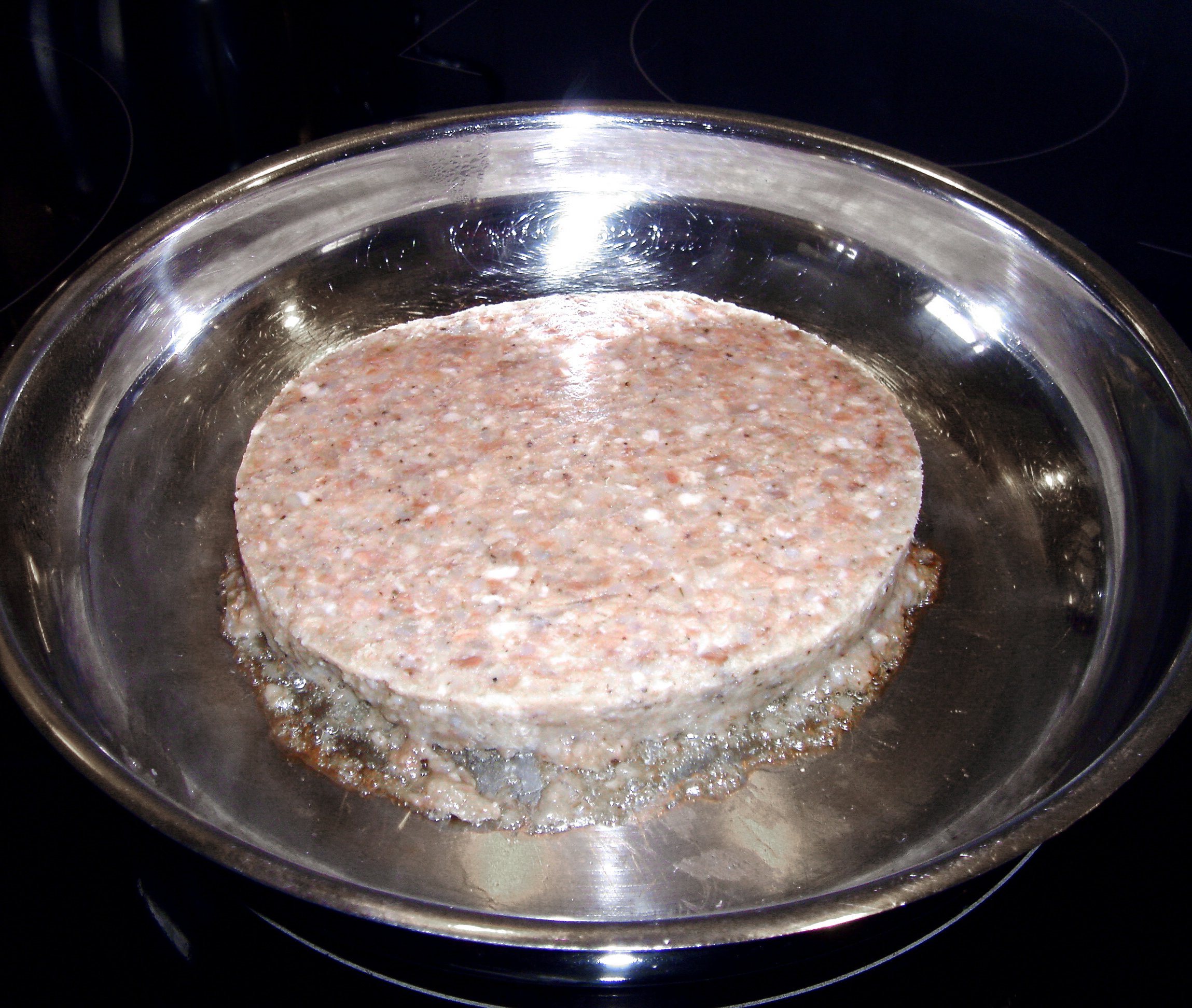 Stippgruetze pan-fried